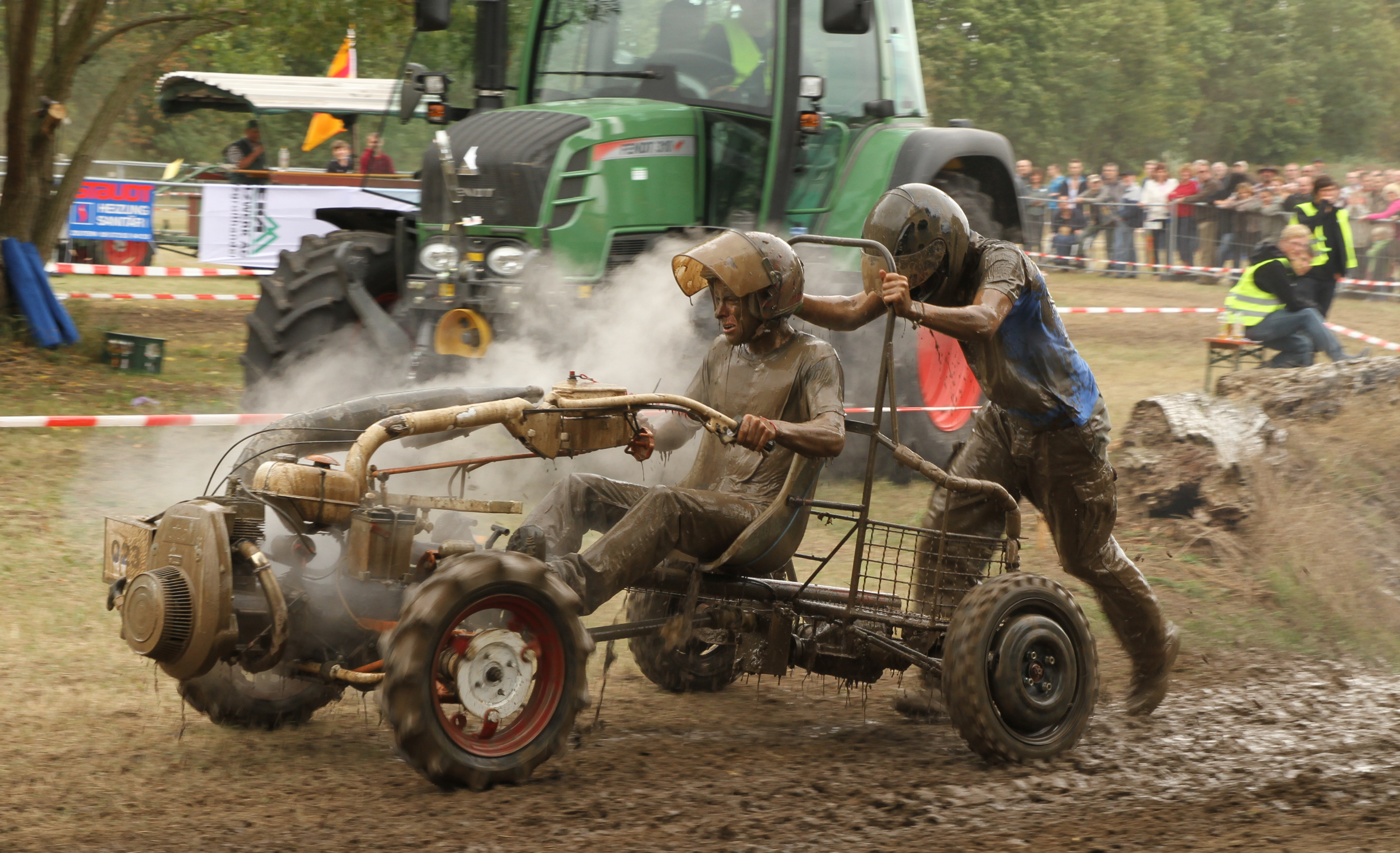 Aufnahme beim Hakorennen 2012 in Ubstadt-Weiher. Das Bild entstand direkt nach der zweiten Wassergrube und zeigt die beiden Teilnehmer mit der Startnummer 23.